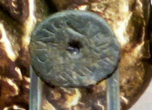 Fusaioa no Museo das Mariñas.